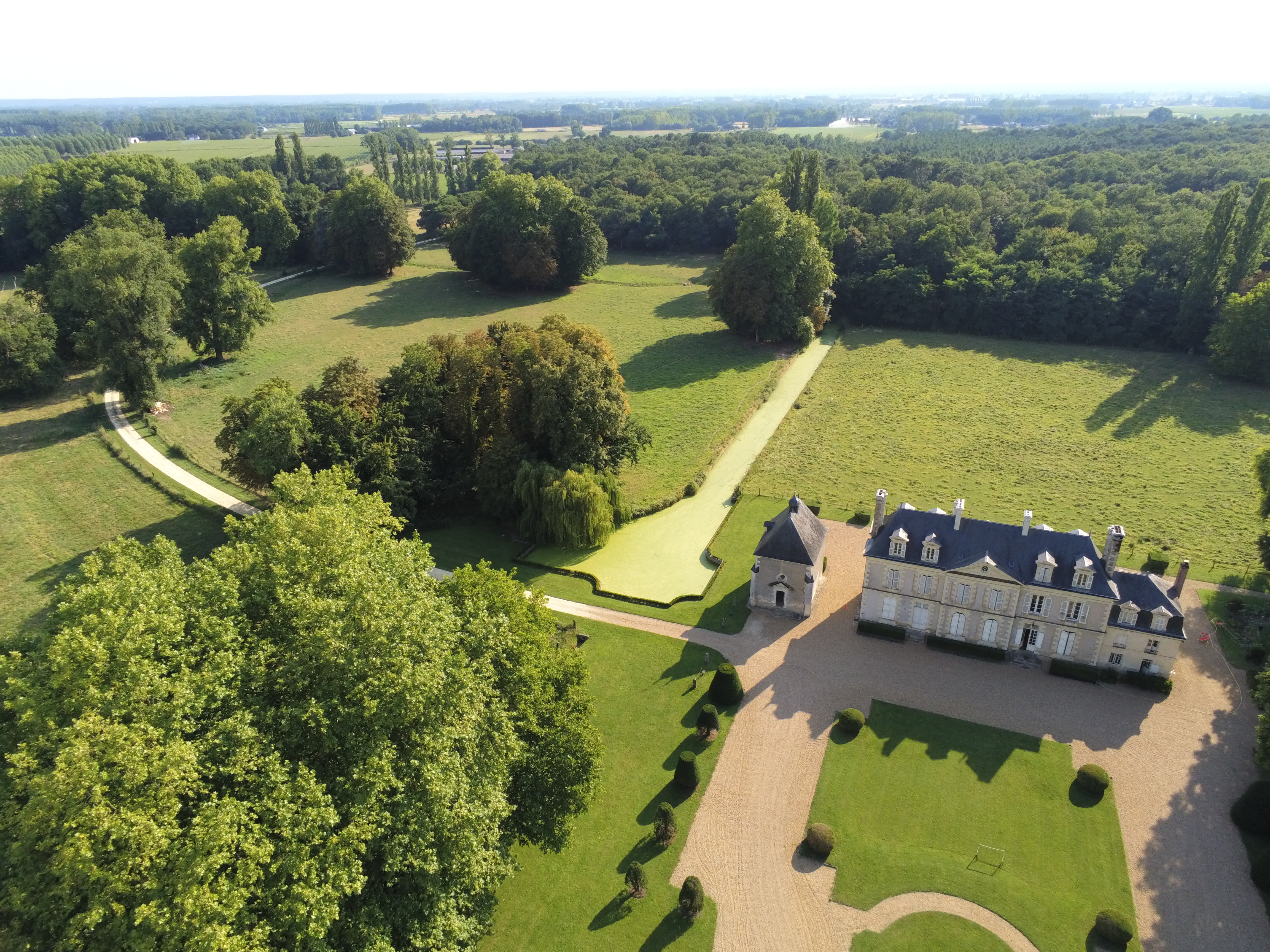 Vue aérienne